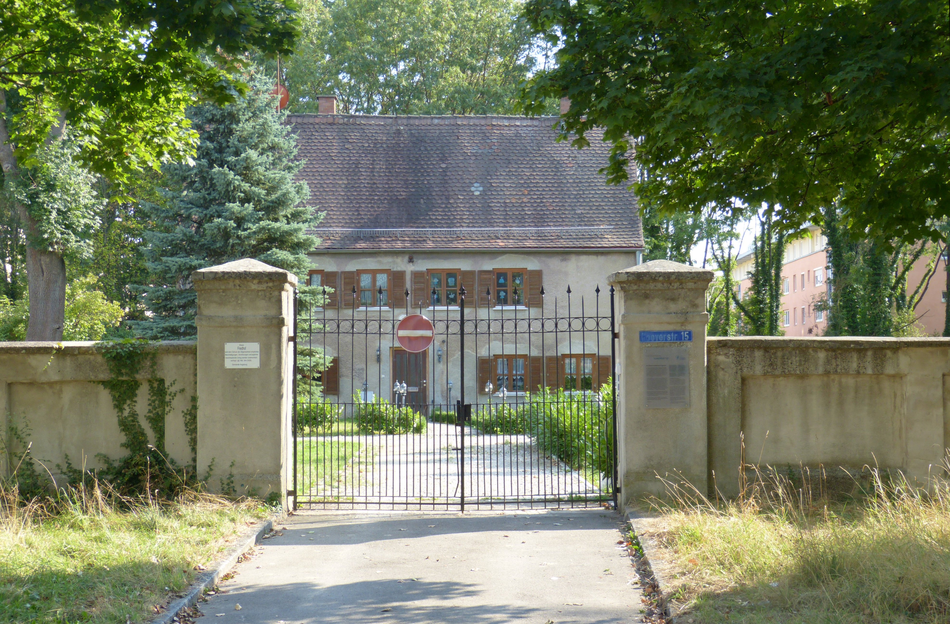 Jüdischer Friedhof Kriegshaber: Eingangstor This is a photograph of an architectural monument.